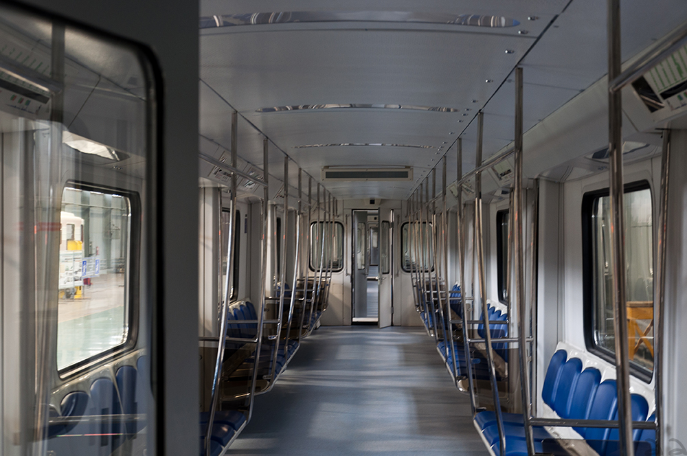 Салон электропоезда метро 81-780/781 «Ладога»